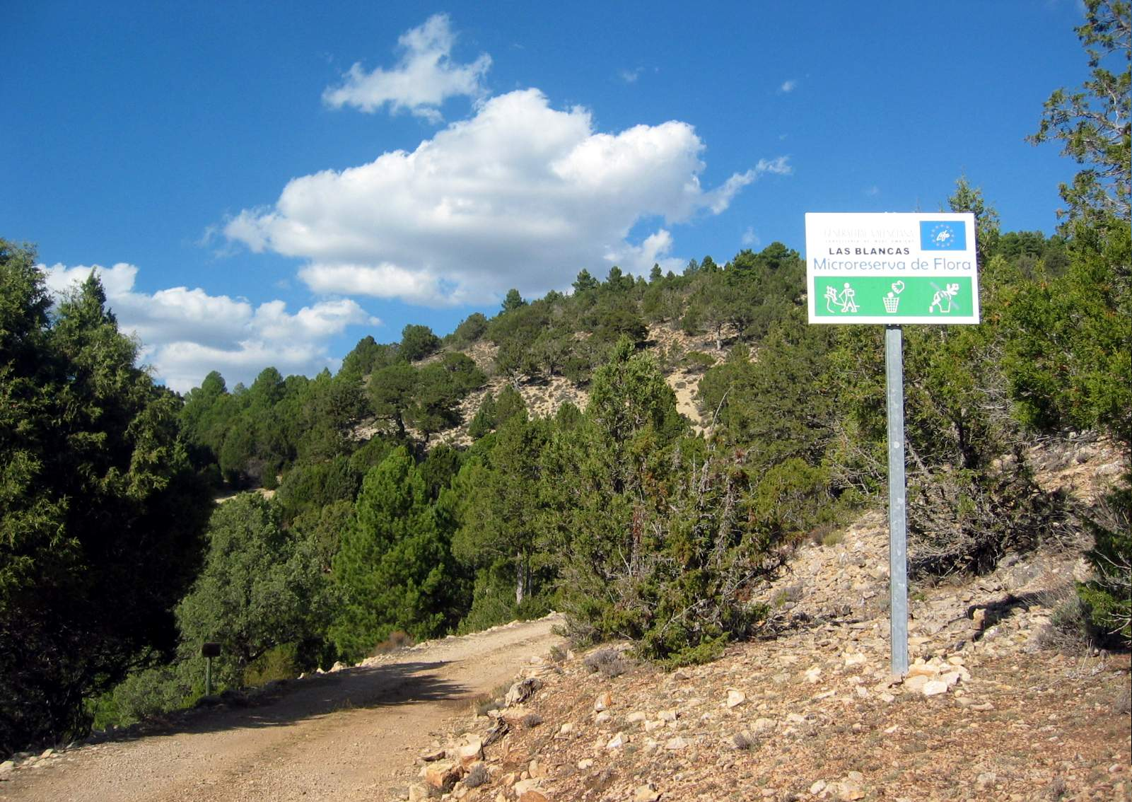 Detalle de cartel indicador de Micorreserva de flora en el Sabinar de las Blancas del Parque Natural de Puebla de San Miguel (Valencia), 2014.